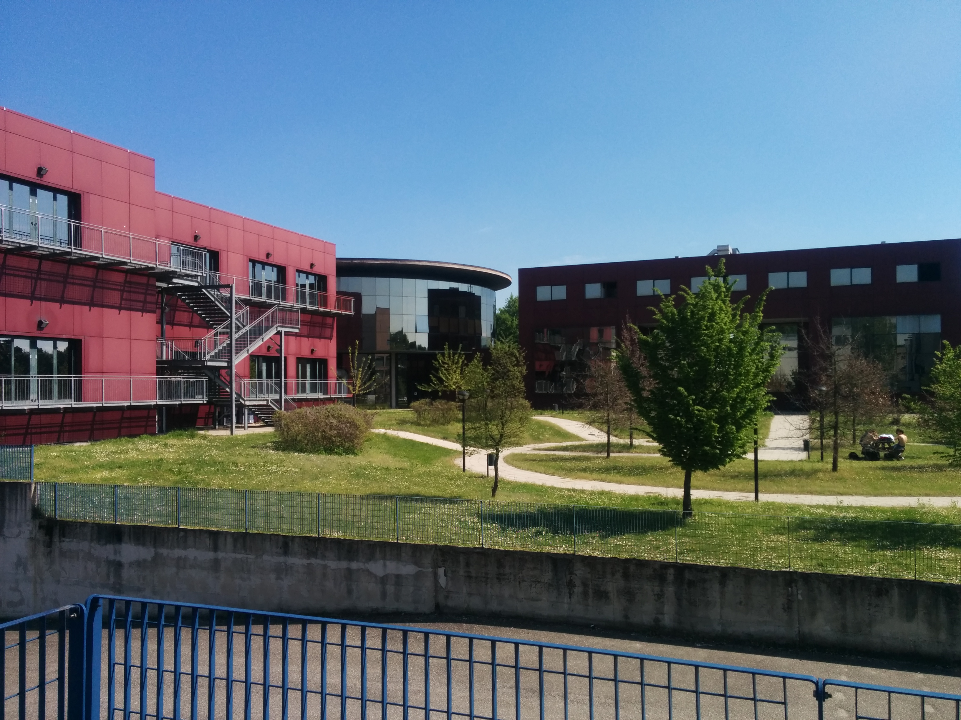 Polo di Ingegneria, sezione "Tamburo" sede di aule didattiche e dell'omonima biblioteca.